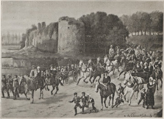 Tableau de A. de Clermont-GaIlerande, Départ pour les courses de Corlay